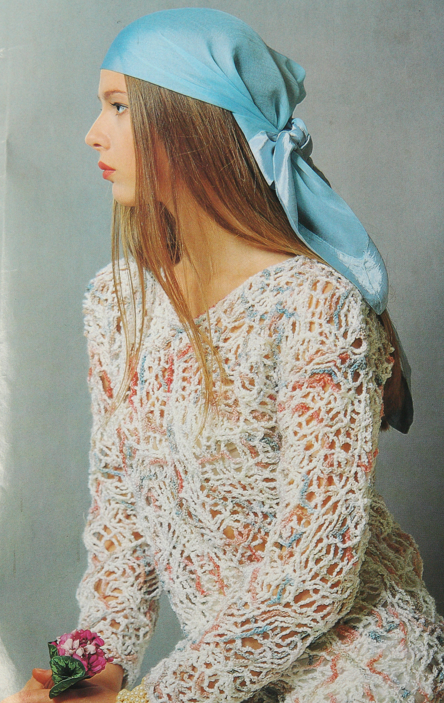 Кружево, выполненное коротким крючком на бумаге по авторской технологии -Патент РФ №2093625 на изобретение "Способ вязания"